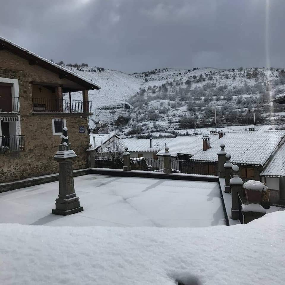 Plaza Don Simón, nombrada así en honor al fundador de las escuelas situadas en frente.